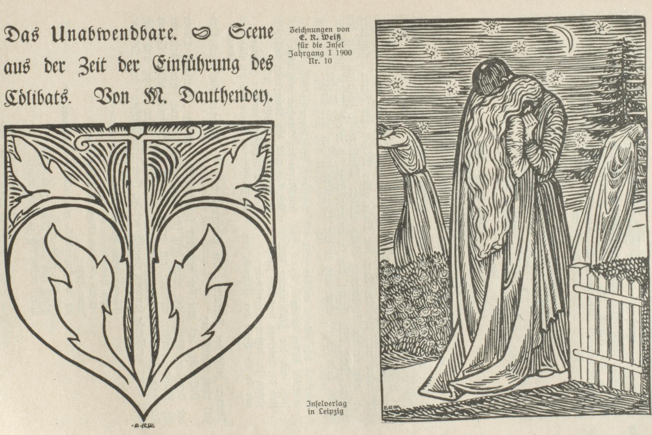 Emil Rudolf Weiß zwei Illustrationen zu Max Dauthendey Das Unabwendbare die Jahresangabe ist noch unklar